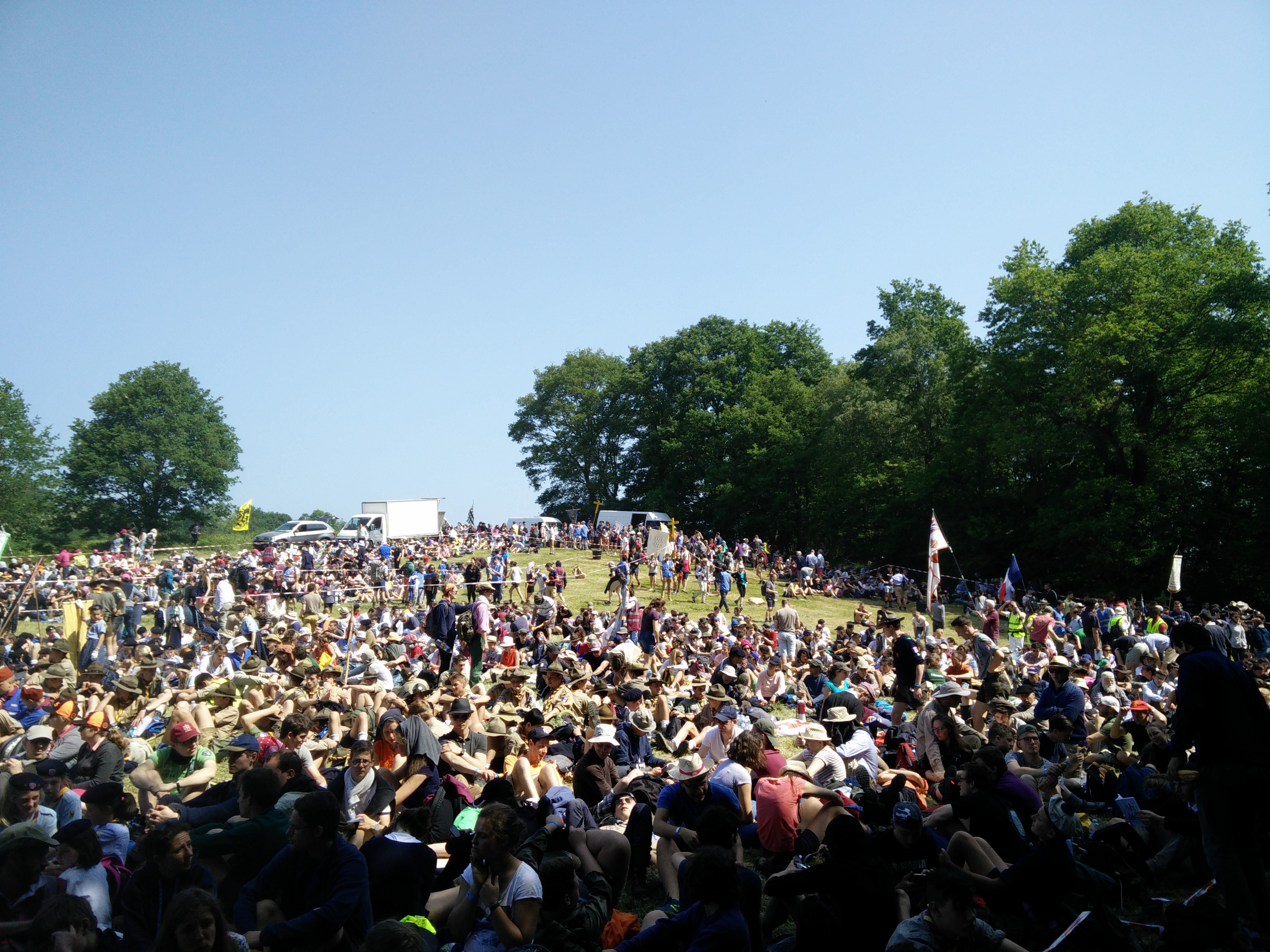 Édition 2018 du pélerinage organisé par l'association « Notre-Dame de Chrétienté, basée à Viroflay